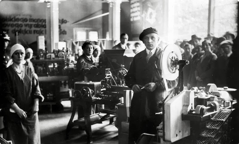 Табачная фабрика Львов. 1930-е годы